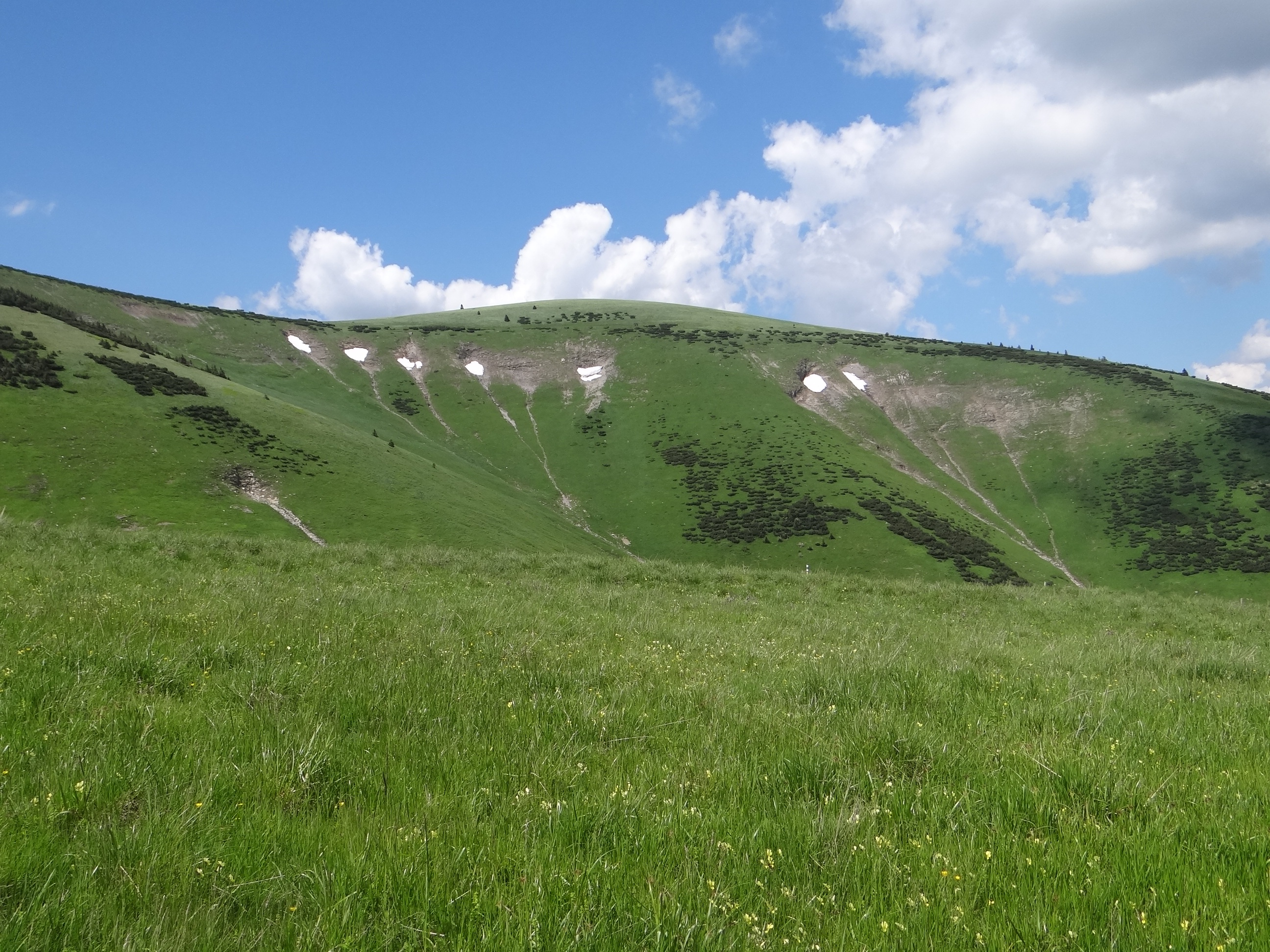 Hornojelenská dolina i Rybovské sedlo